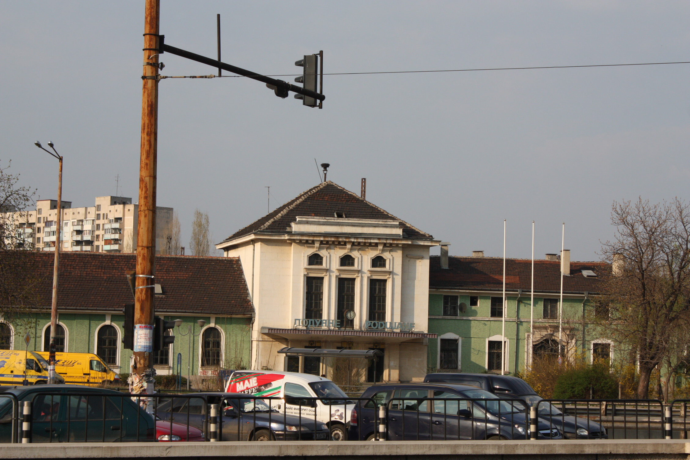 Poduyane Rayon, Sofia, Bulgaria